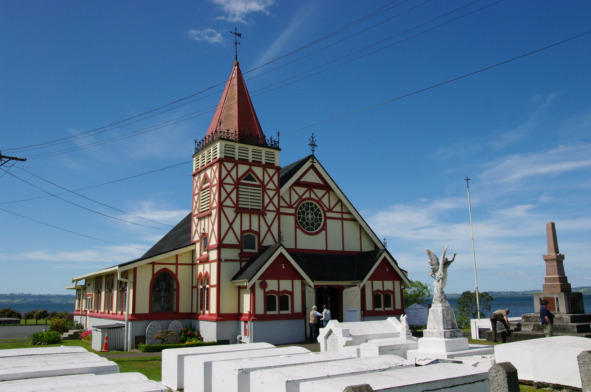 Kirche im Maori-Stil Ohinemutu, Rotorua, NZL